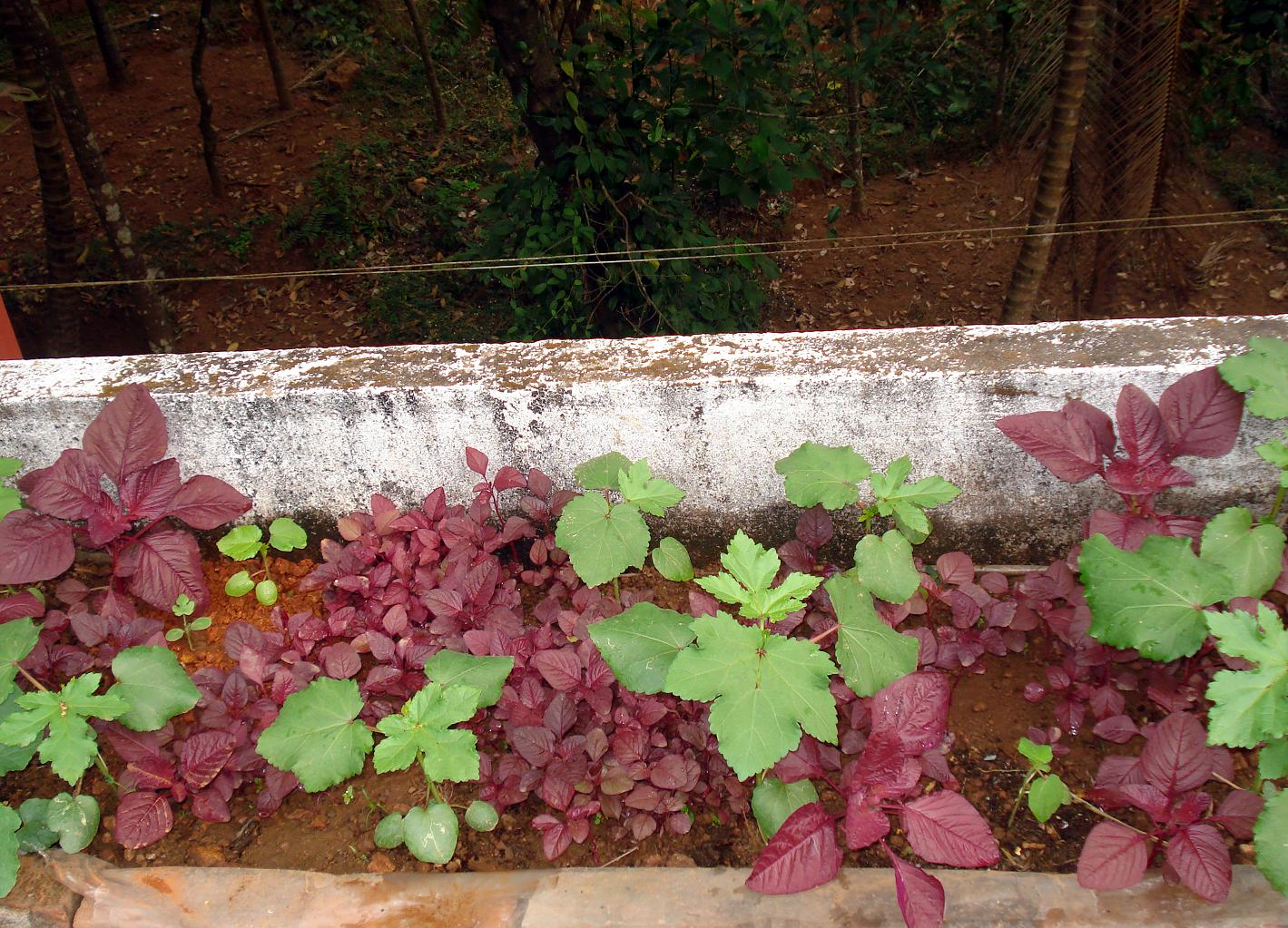 വെണ്ടകൃഷി ടെറസ്സിൽ Lady’s finger Name : Abelmoschus esculentus Family : Malvaceae മിക്കവാറും രാജ്യങ്ങളിൽ കൃഷിചെയ്യുന്നതും; പച്ചക്കറി വിഭാഗത്തിൽ ഉൾപ്പെടുന്ന കായ് ഉണ്ടാകുന്നതുമായ ഒരു സസ്യമാണ് വെണ്ട. ആംഗലേയത്തിൽ ഇതിനെ Okra , Lady's fingers എന്നീ പേരുകളിലും അറിയപ്പെടുന്നു.